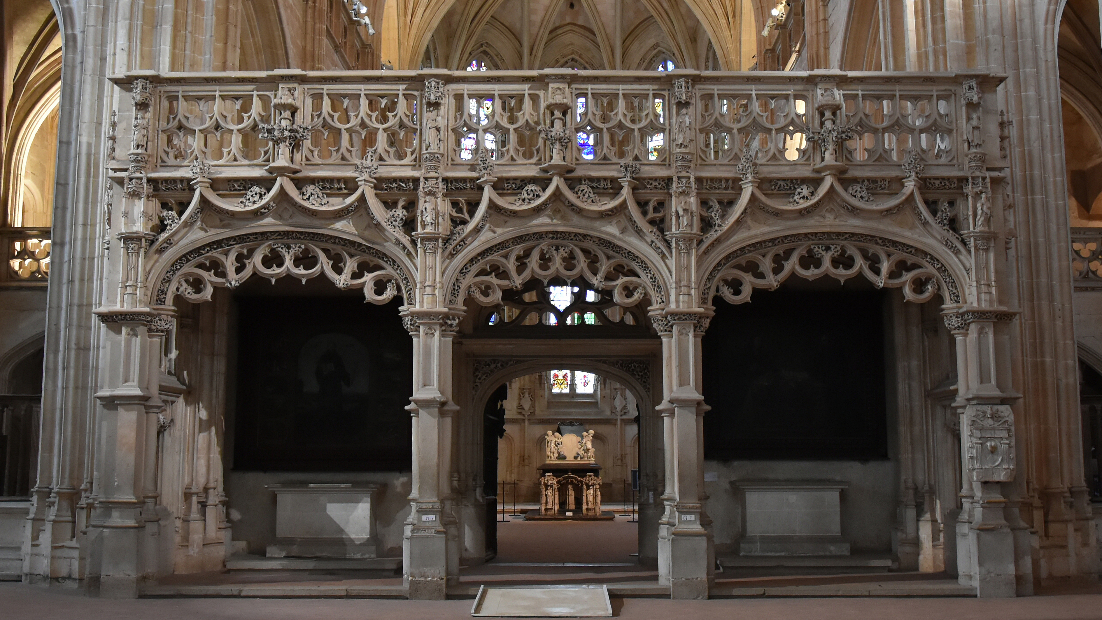 Het doksaal van de kerk van Nicolaas van Tolentijn te Bourg-en-Bresse